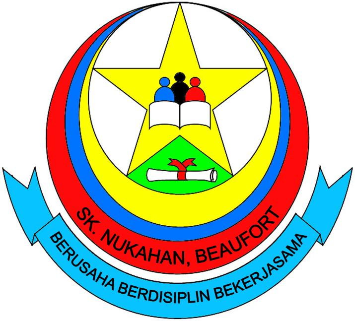 Lencana Sekolah